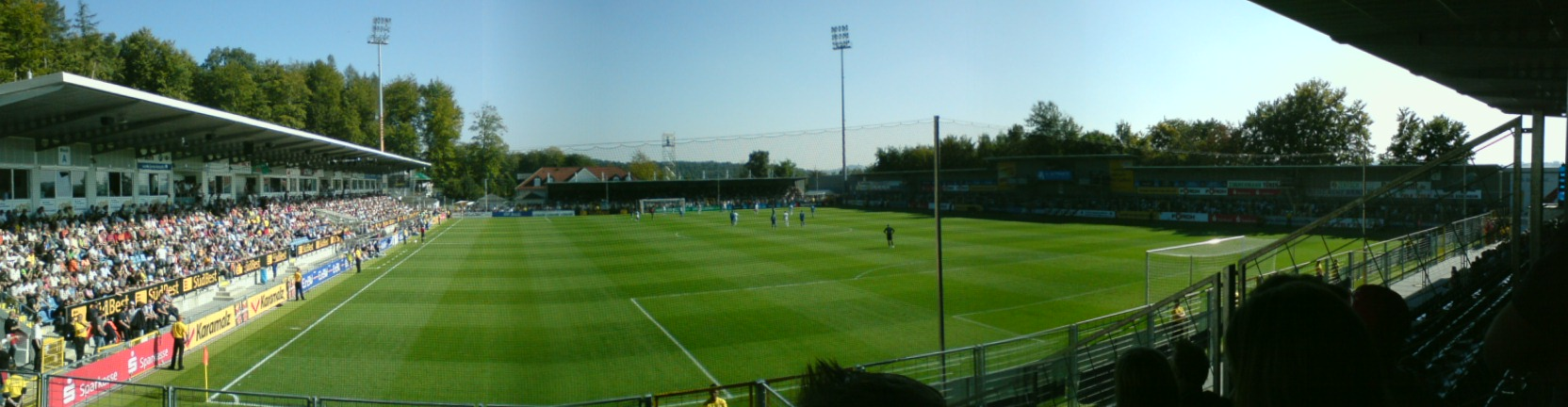 Dietmar-Hopp-Stadion Hoffenheim, 2. Liga-Spiel TSG 1899 Hoffenheim gegen VfL Osnabrück am 16.09.2007